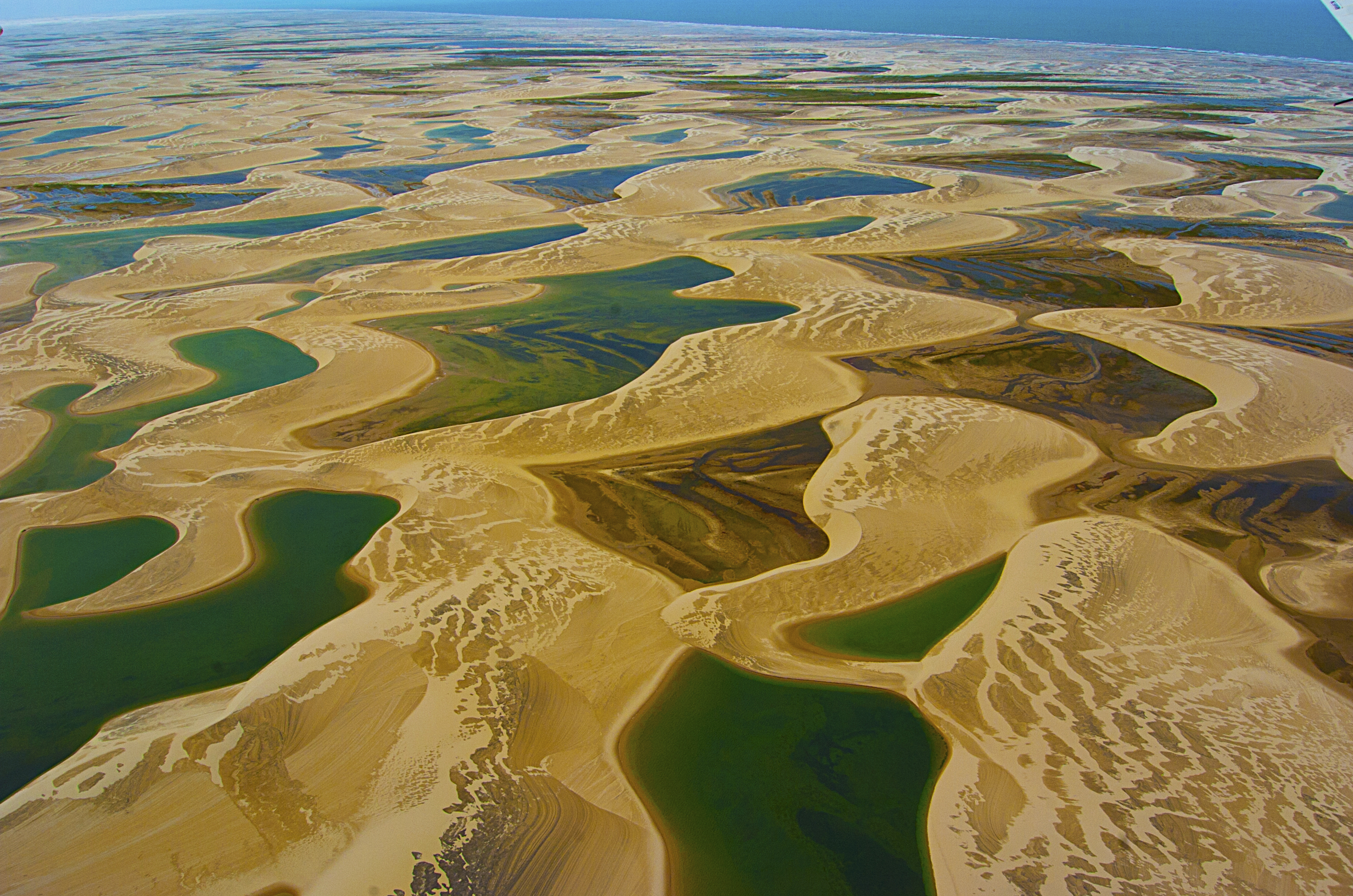 Parque Nacional dos Lençois Maranhenses